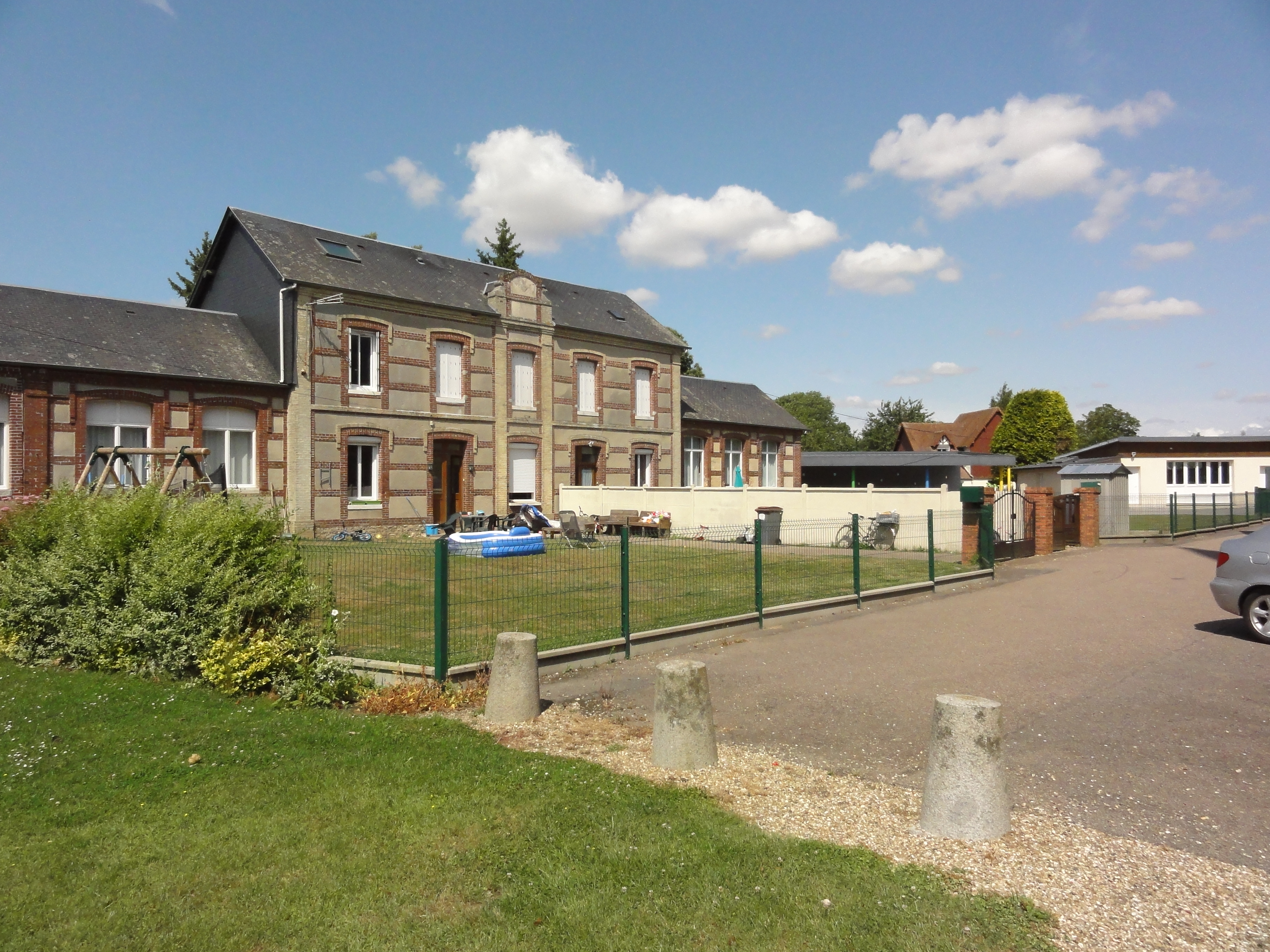 Saint-Clair-sur-les-Monts (Seine-Maritime) écoles